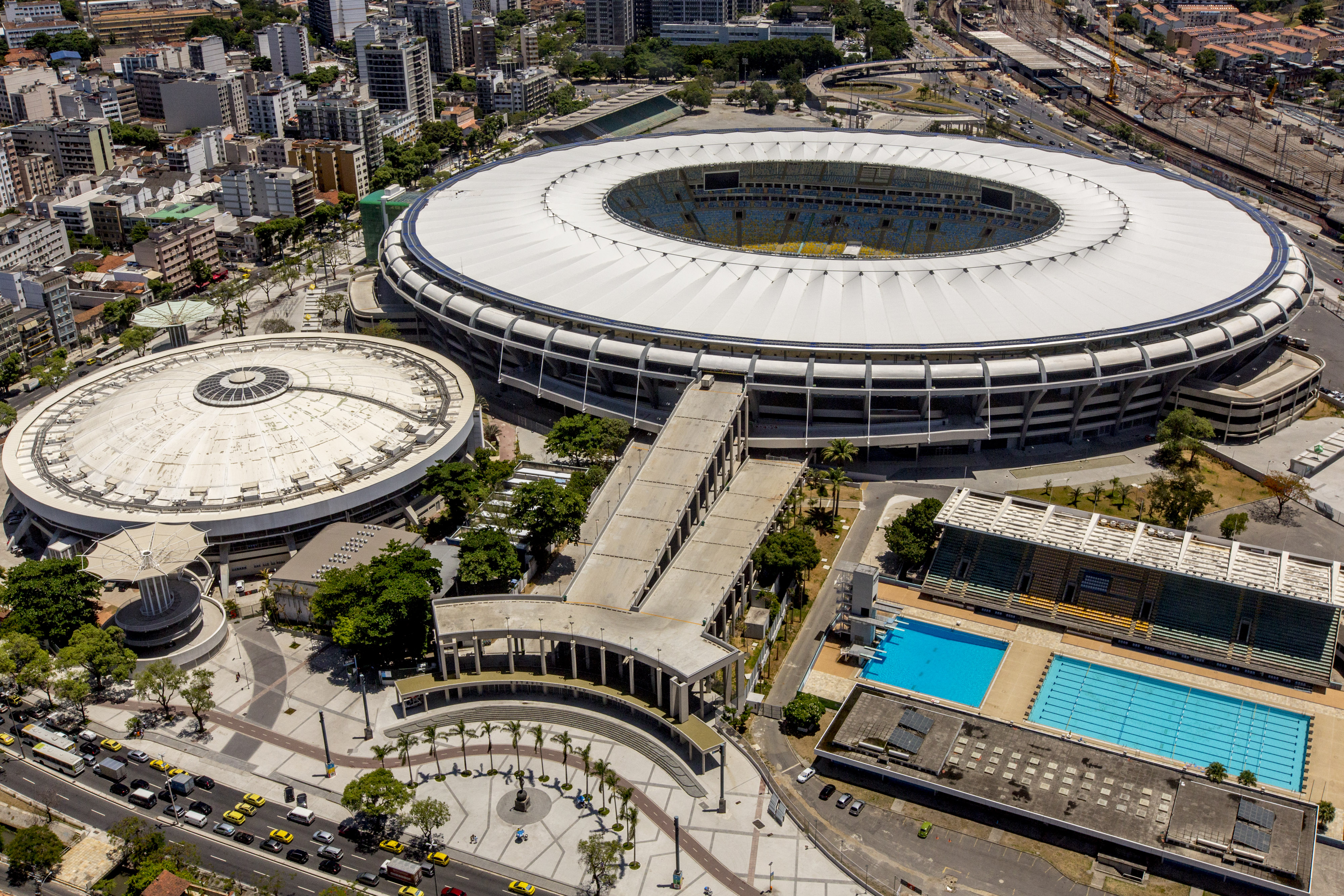 Estádio Jornalista Mário Filho, mais conhecido como Maracanã. Foto de fevereiro de 2014.